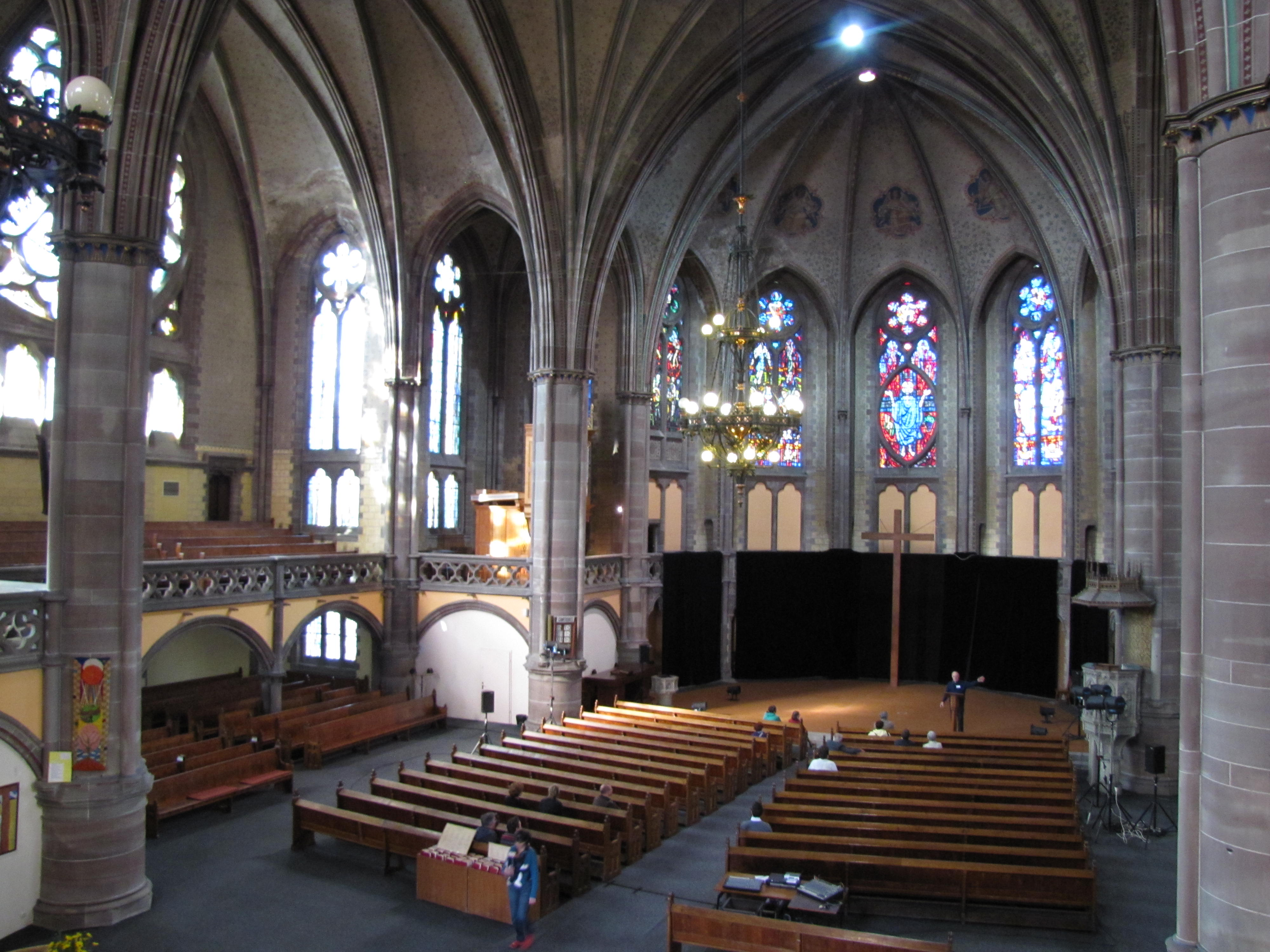 Alsace, Bas-Rhin, Église réformée Saint-Paul (1892) de Strasbourg (PA00085029), place du Général-Eisenhower: Vue intérieure de la nef (Hallenkirche).